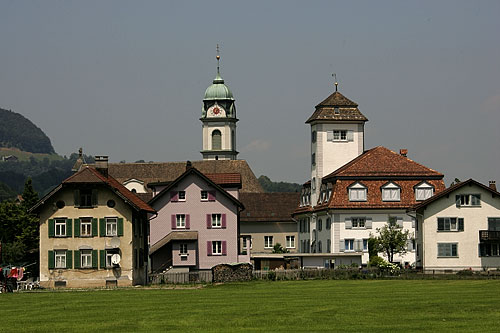 Näfels rund um die Kirche